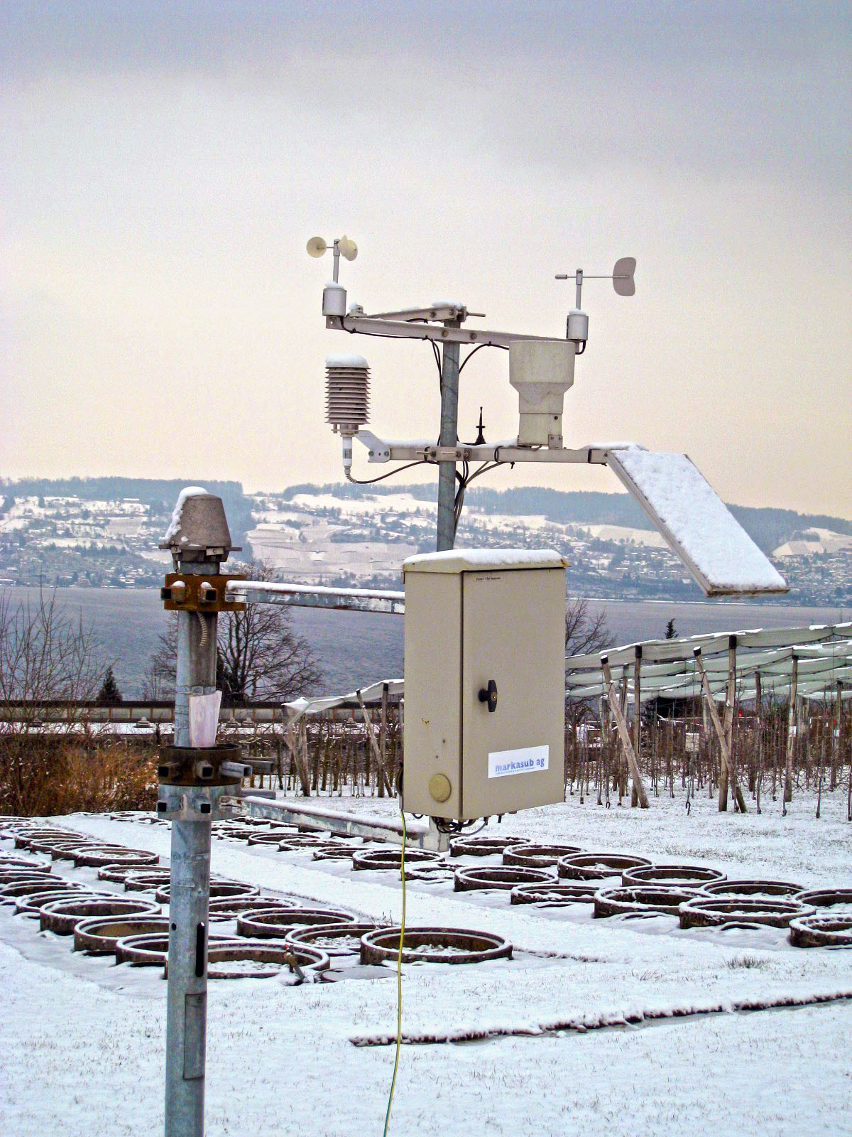 NADAM-Messstation an der Hochschule Wädenswil